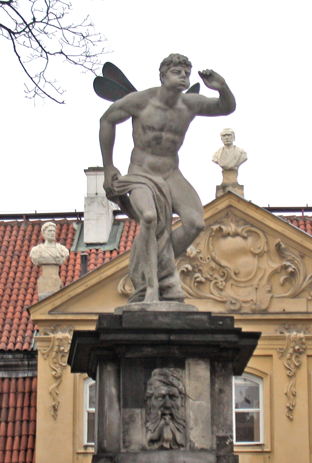 Varsavia, Palazzo dei Quattro Venti (Pałac Pod Czterema Wiatrami) su via Długa, statua di un vento ("Borea").